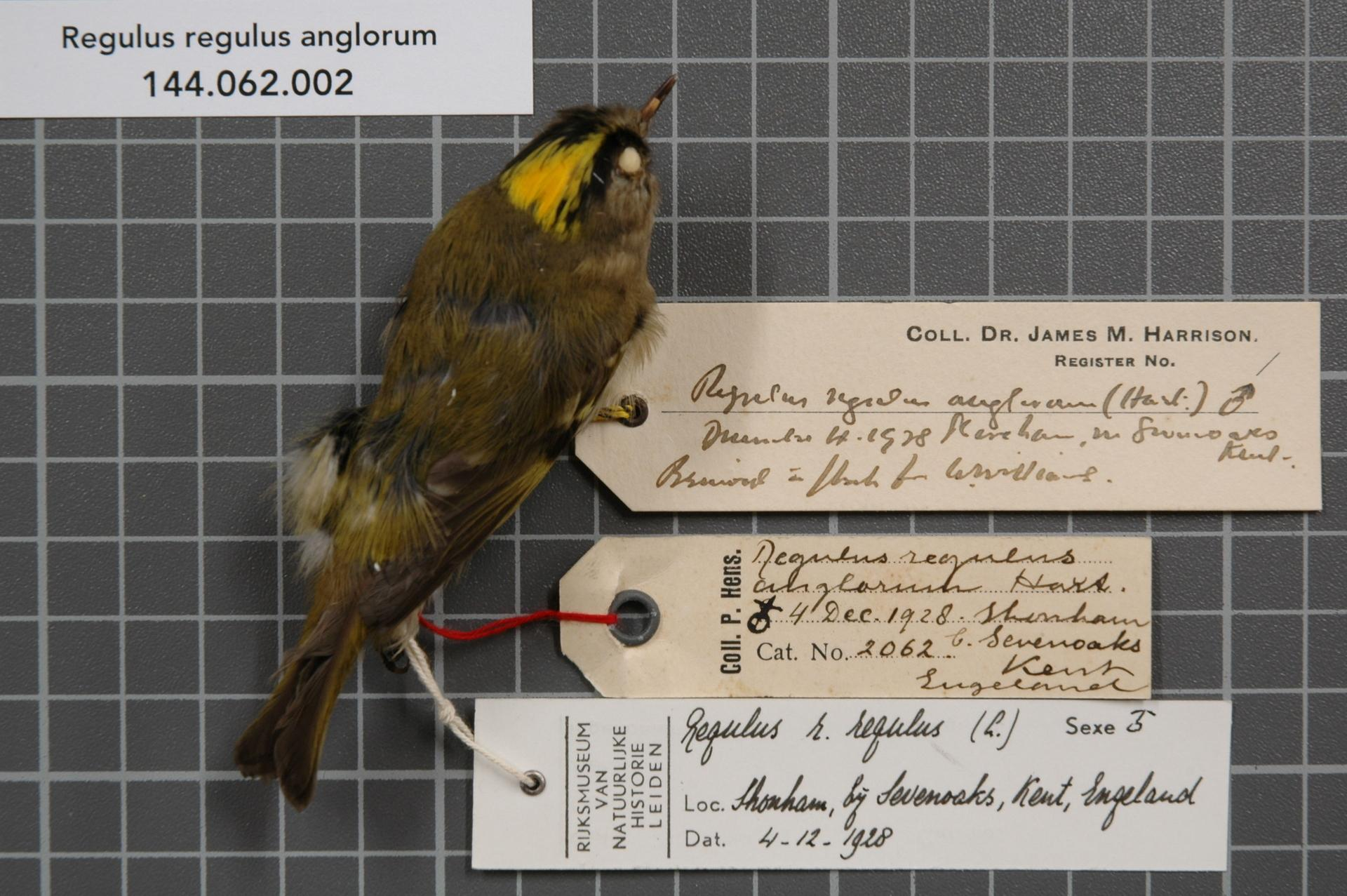 Regulus regulus anglorum Hartert, 1905